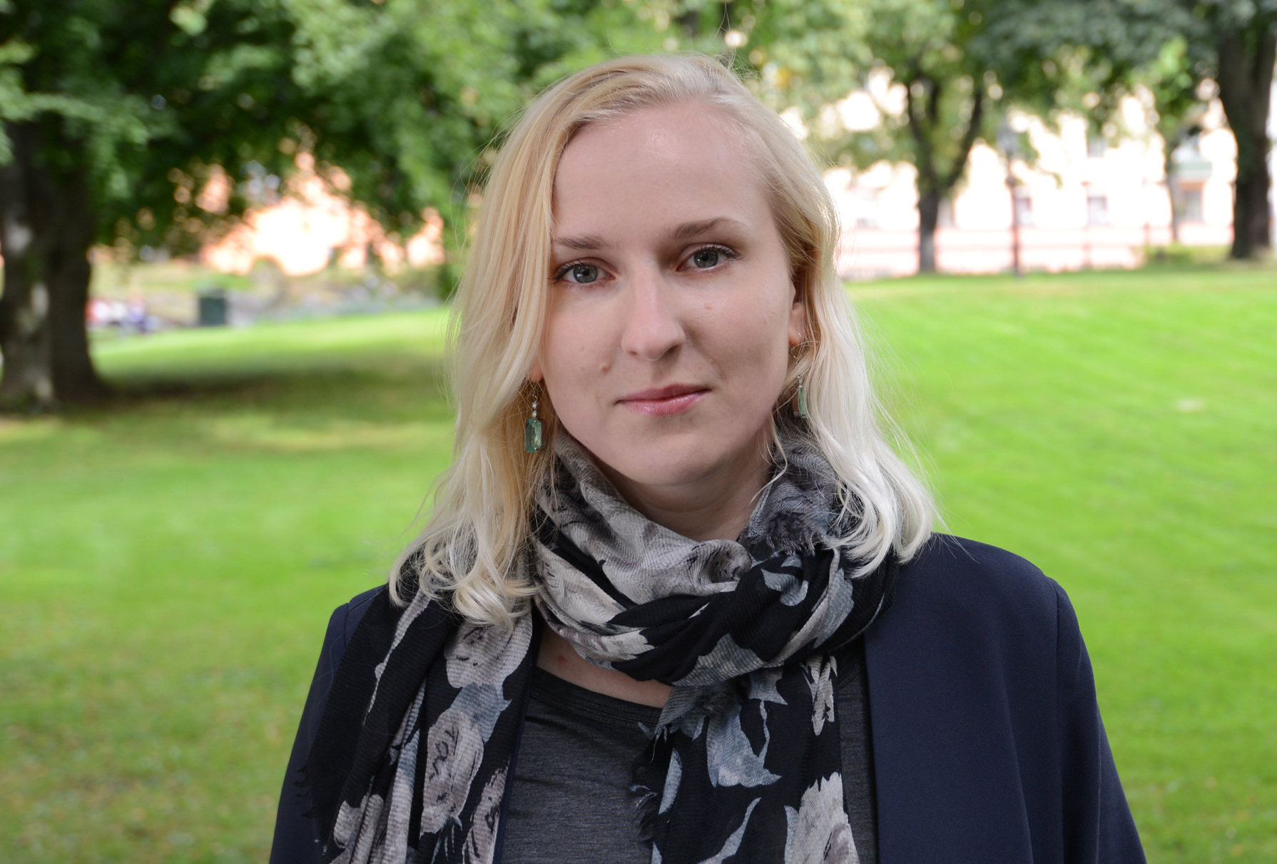 Ina Bäckström 2015